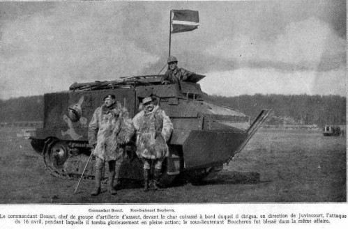 L-Illustration-3872-du-19.05.1917 le commandant Bossut devant son char qu'il utilisait le 16 avril 1917.